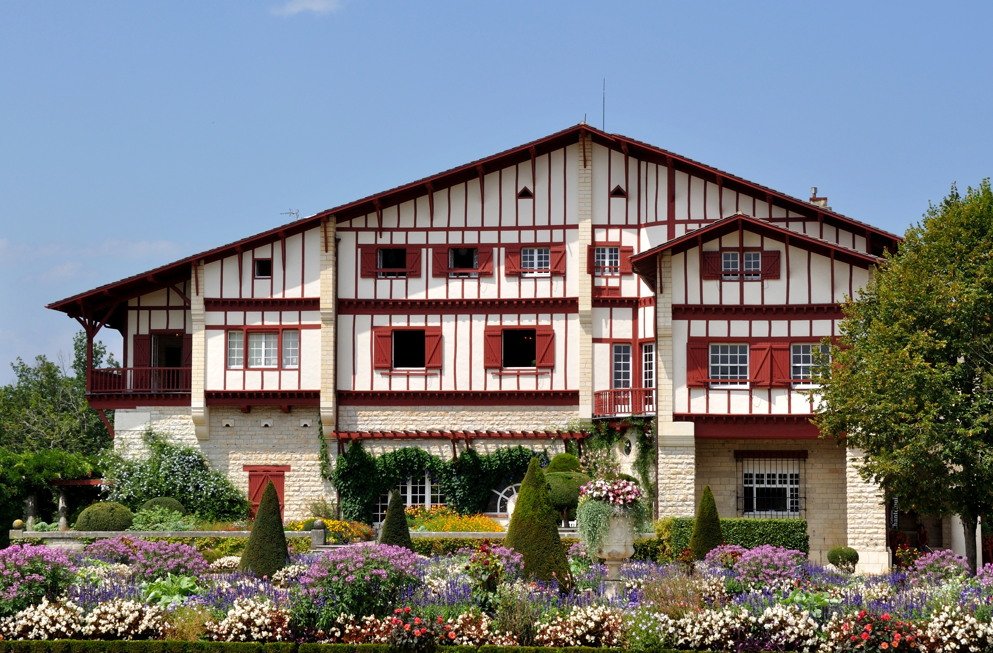 Façade orientale de la villa Arnaga à Cambo-les-Bains (Pyrénées Atlantiques). Elle abrite aujourd'hui le musée Edmond Rostand.